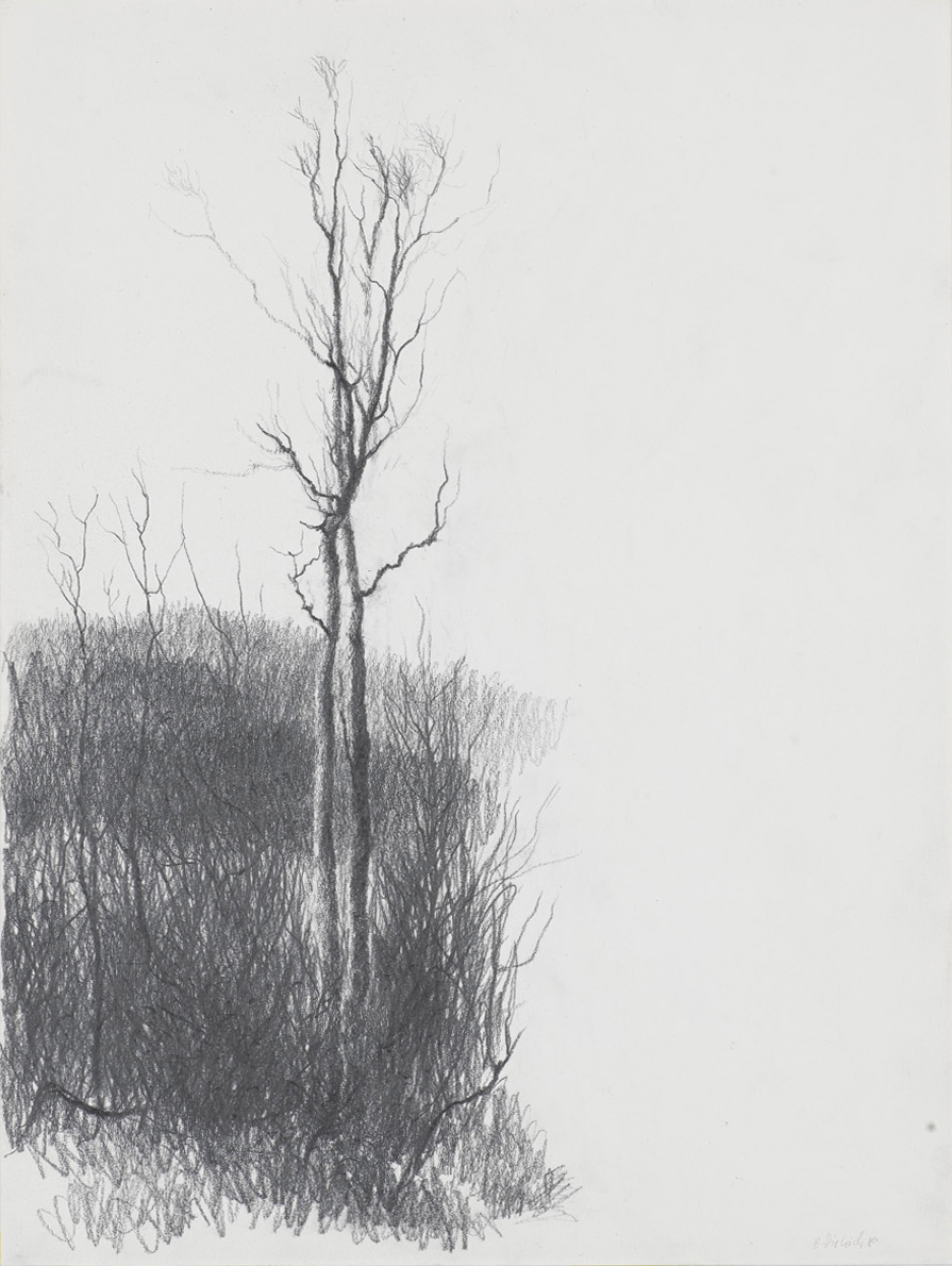 Hubert Dietrich: Zwei Bäume, Bleistift auf Papier, 48x36cm, 1980, WVZNr. z81